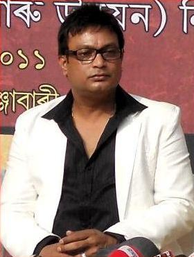 অসমীয়া: যতীন বৰা, অসমীয়া চলচ্চিত্ৰ অভিনেতা